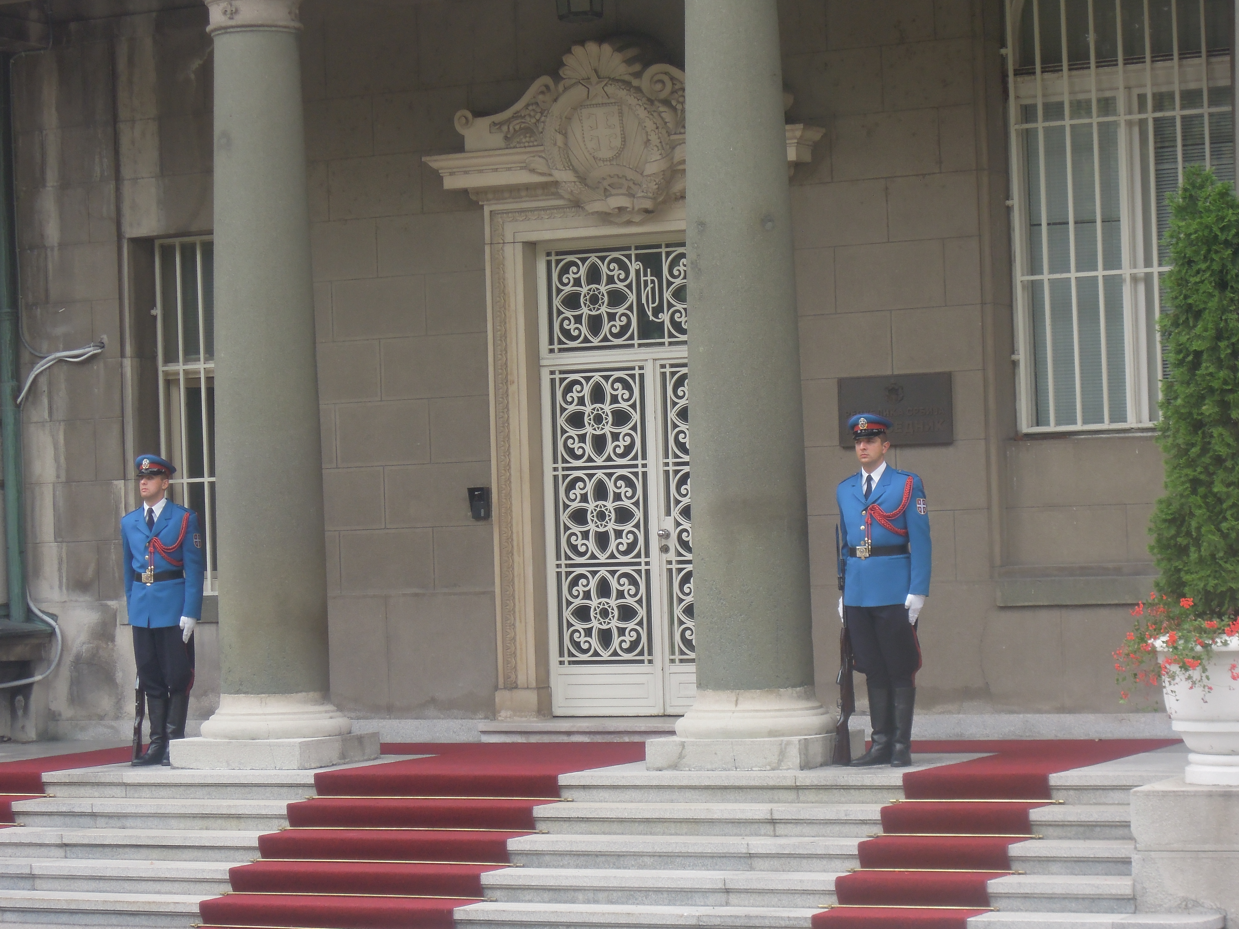 Zgrada Novog dvora u Beogradu.